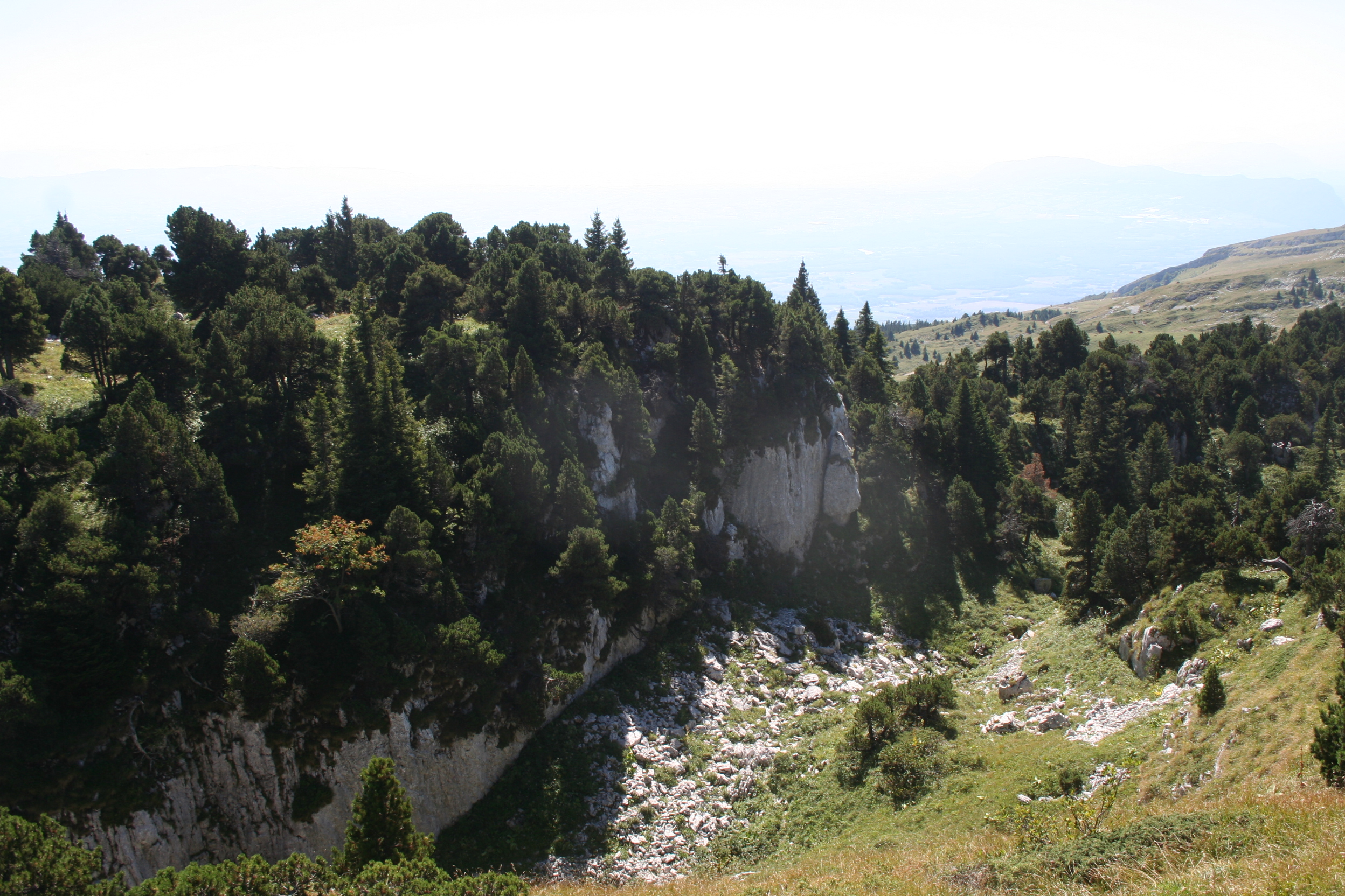 Canyon d'érosion près du Crêt de la Neige. Pins à crochets sur la crête.